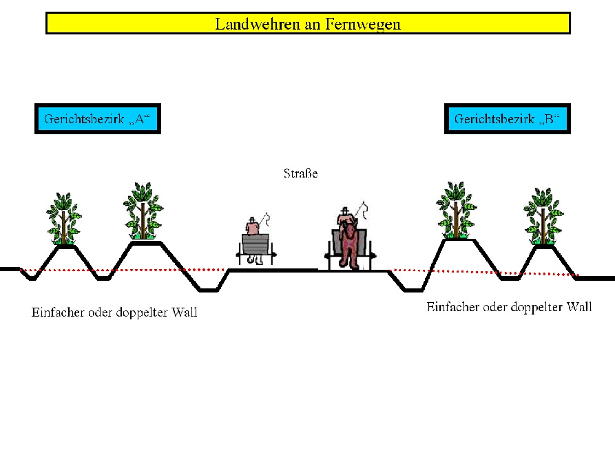 Landwehren an Fernwegen zwischen Gerichtsbezirken